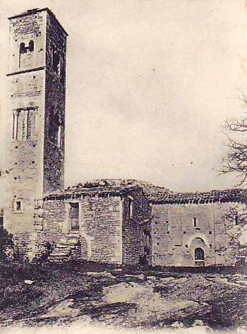 Le prieuré de Saint-Symphorien de Bonnieux en 1900